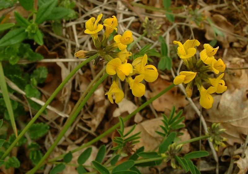 Hippocrepis comosa (fer à cheval), photo J.F. Gaffard , Gy, mai 2004